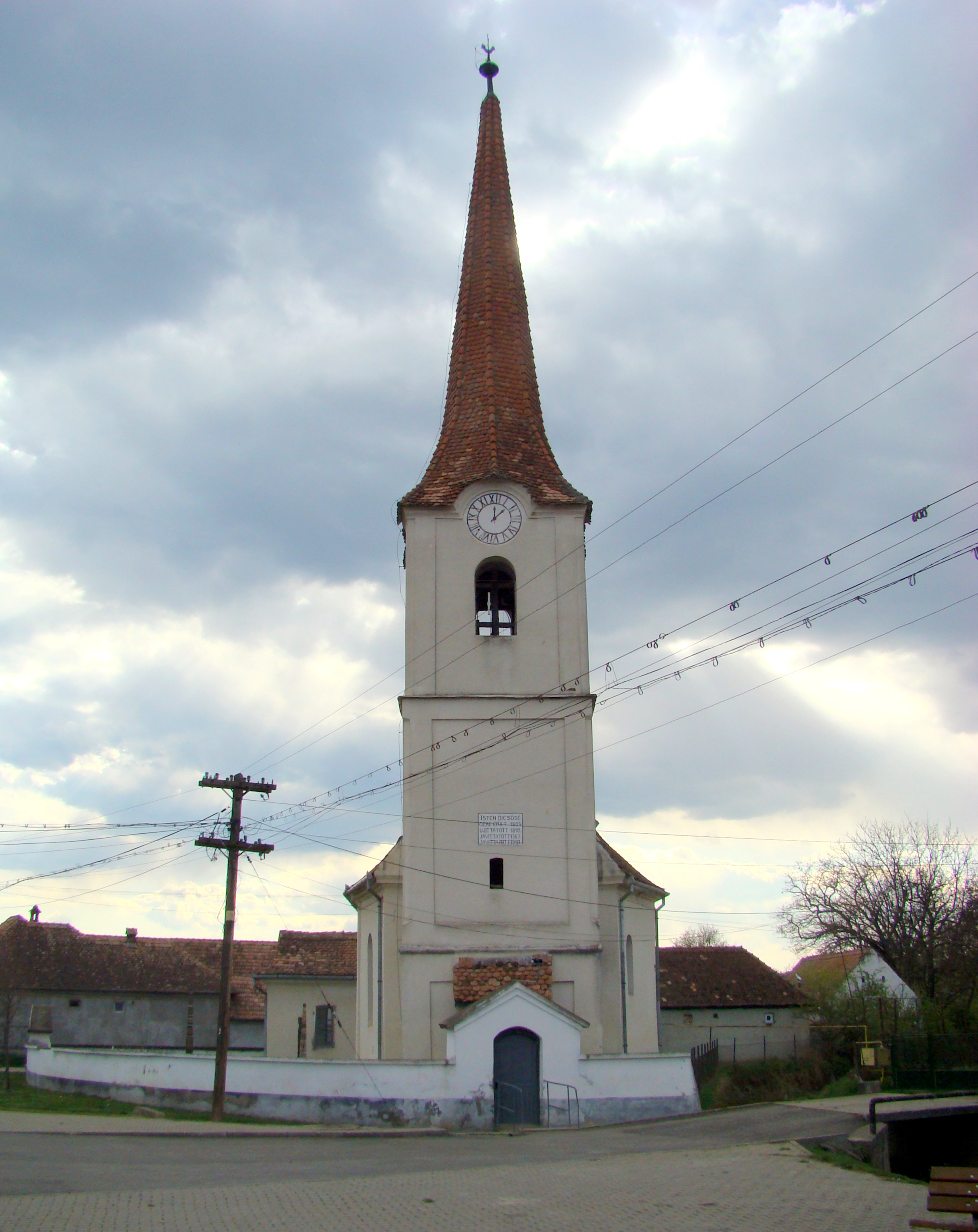 Biserică unitariană și reformată, localitatea Filiaș; oraș Cristuru Secuiesc Str. Filiași 59 1801 - 1803